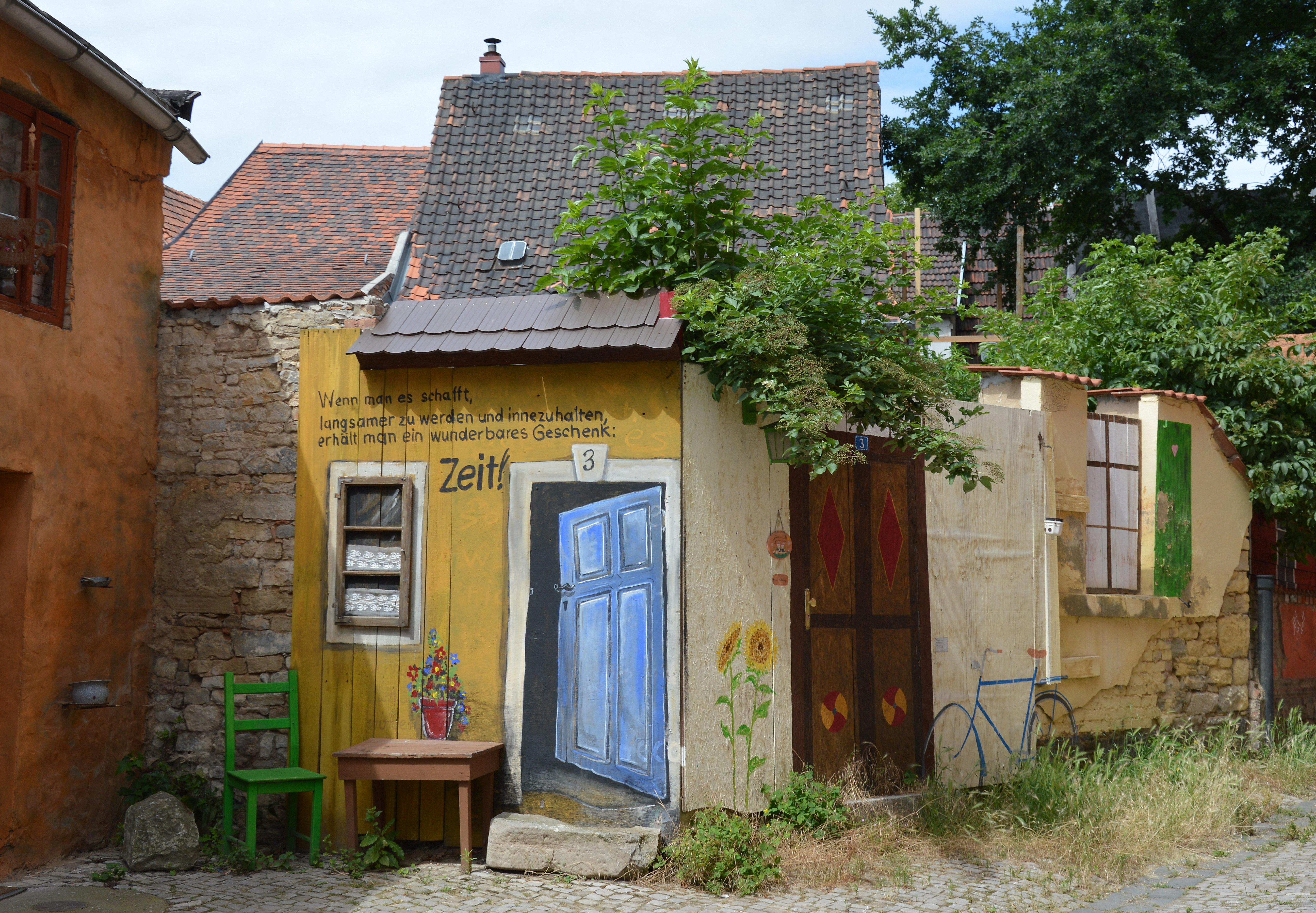 Reste des Hauses Kleiner Halken 3 in Aschersleben